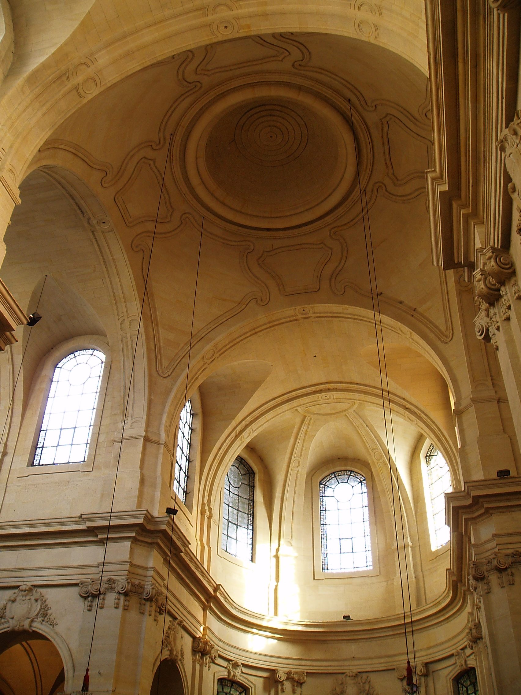 Cathédrale Saint-Louis de Versailles Architecte : Jules Hardouin Mansart de Sagonne Construction : 12 juin 1743 Inauguration : 24 août 1754 consacrée cathédrale en 1843